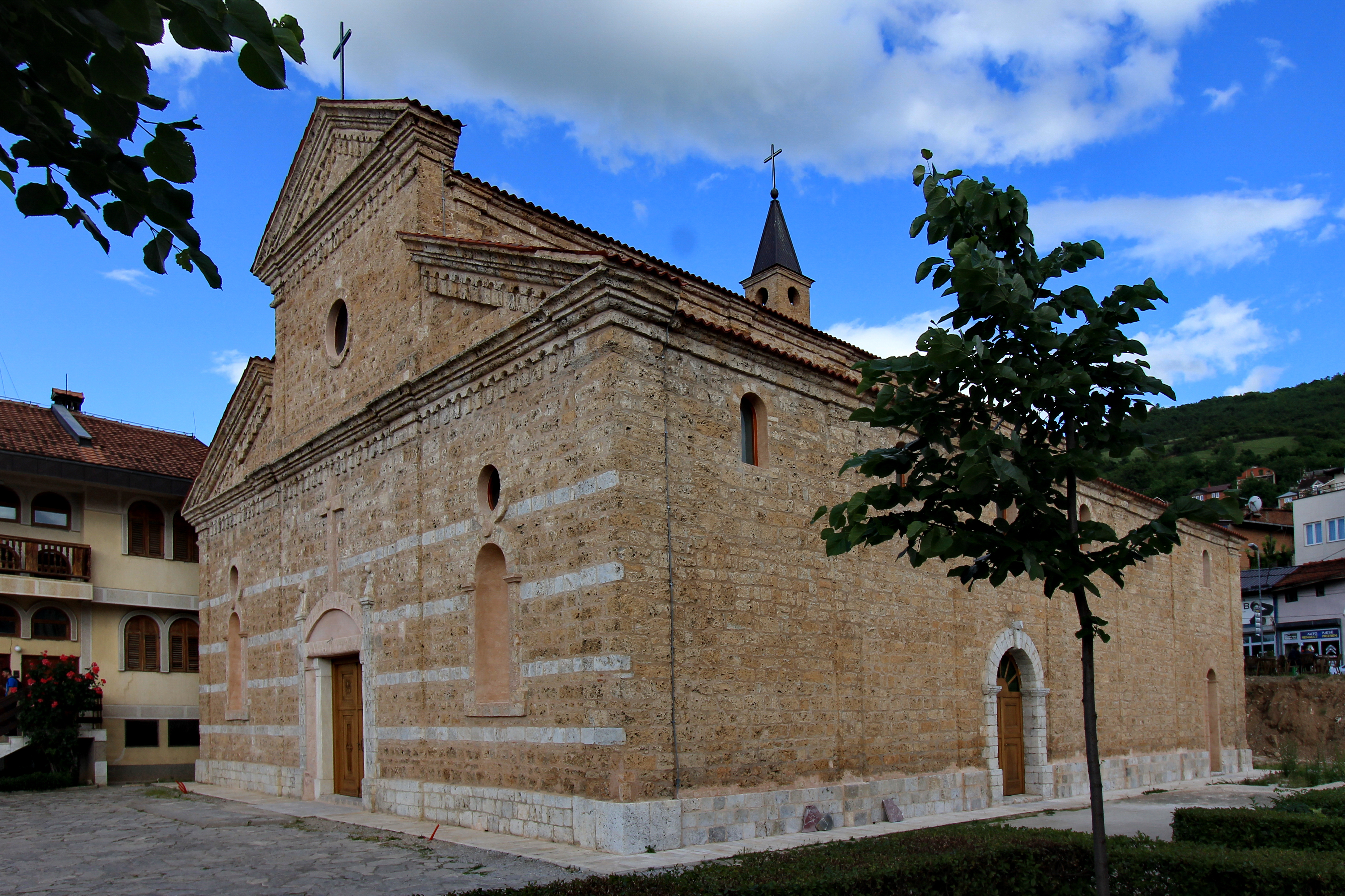 Konkatedrala Zonja Ndihmëtare